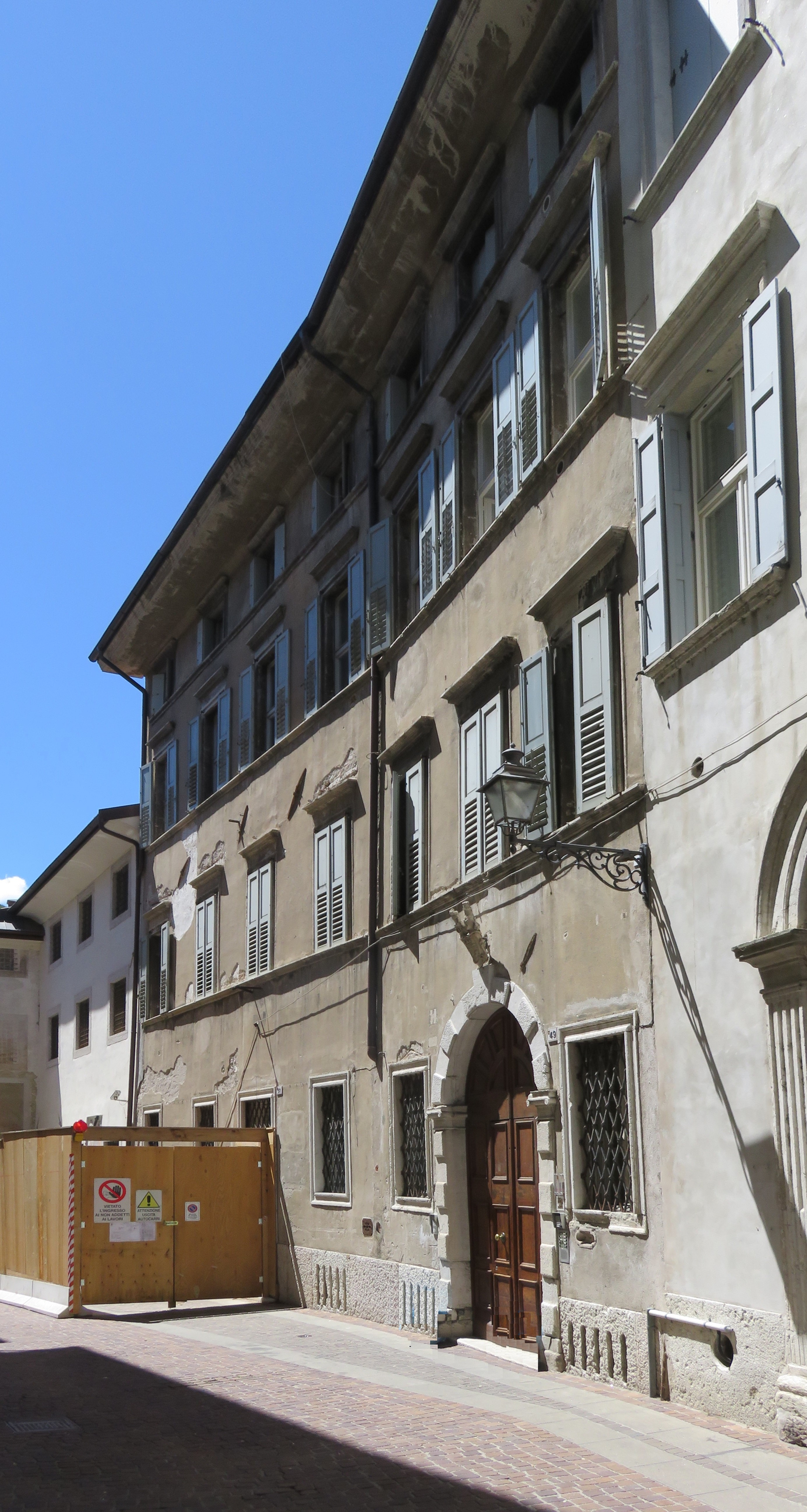 ex casa Vannetti, Rovereto, via della Terra, accanto al vecchio ingresso del Museo Depero